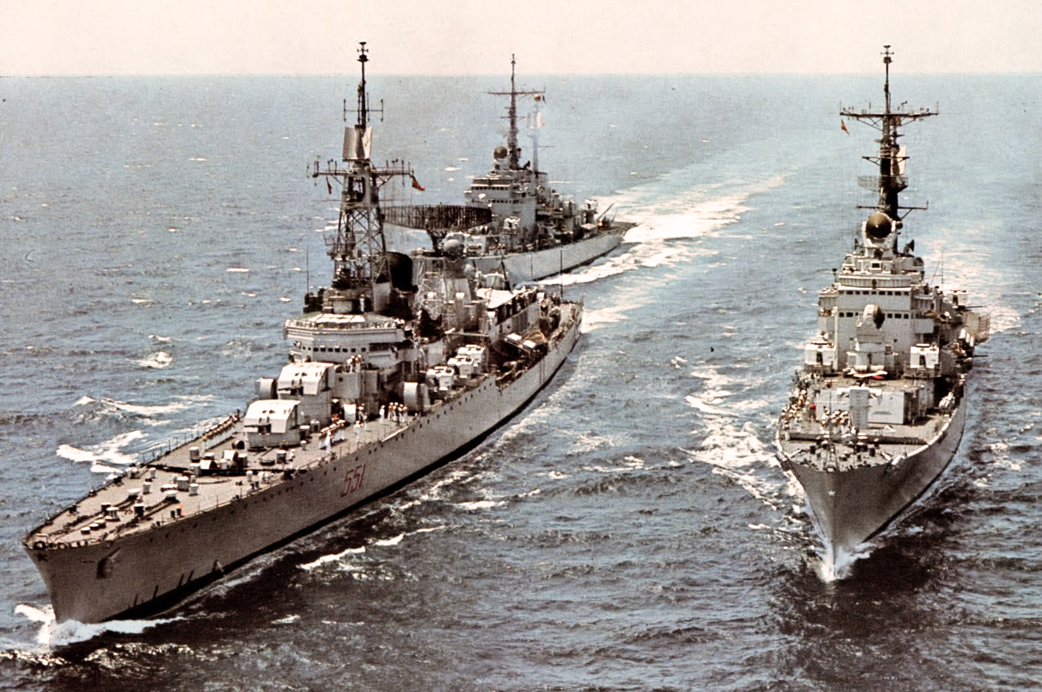 Gli incrociatori Garibaldi Andrea Doria e Caio Duilio in navigazione in una foto tratta da un notiziario della Marina anni 60